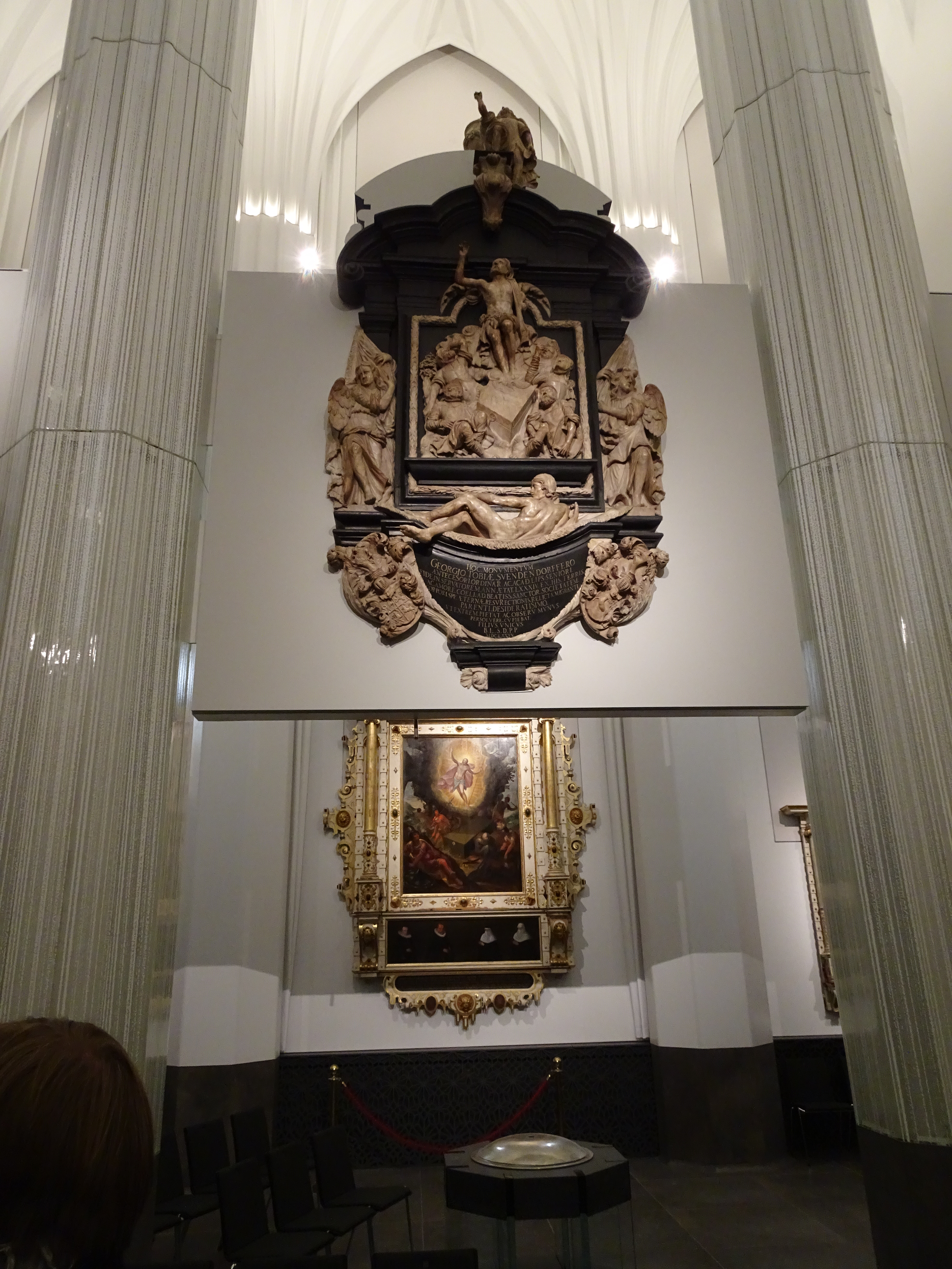 Epitaph für den Juristen Georg Tobias Schwendendörffer in der Leipziger Universitätskirche